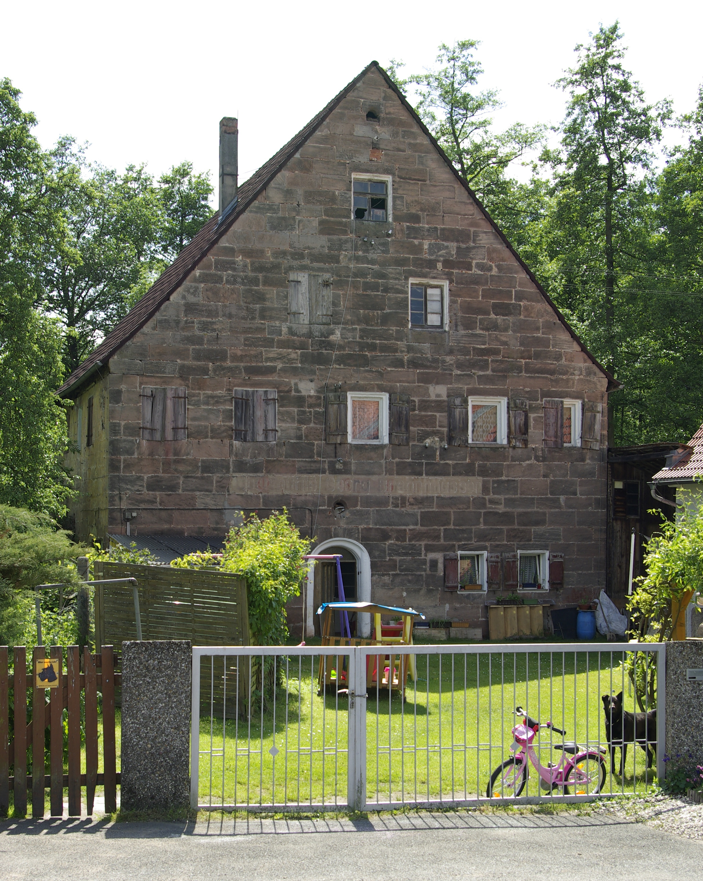 Die Obermühle in Kleingründlach